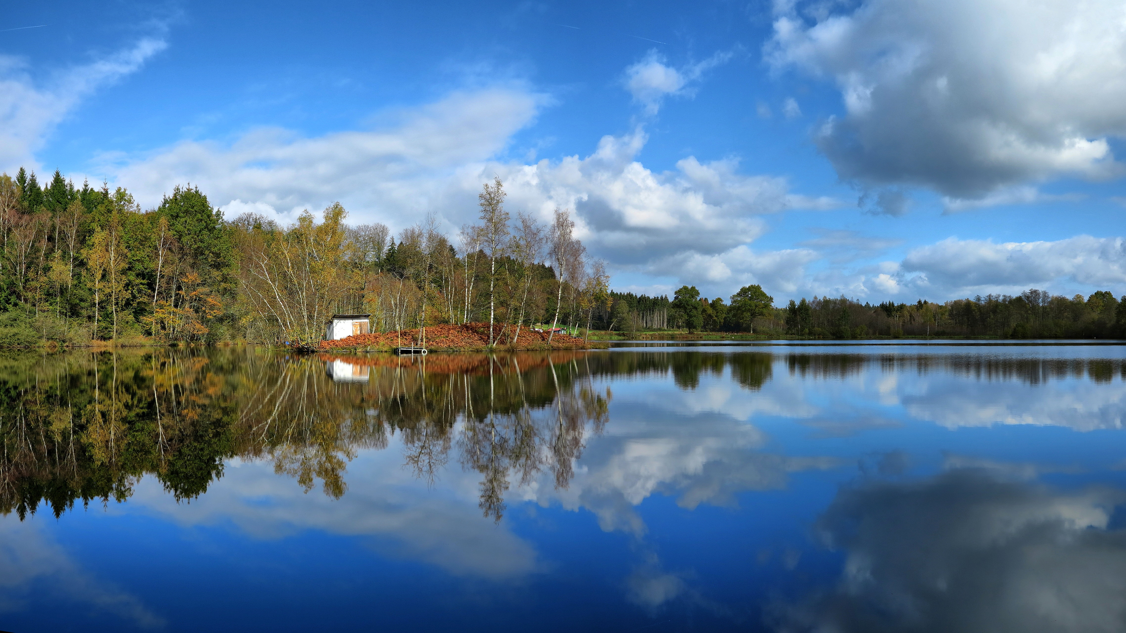 Parc naturel régional des Ballons des Vosges Photo prise le 23/10/2014